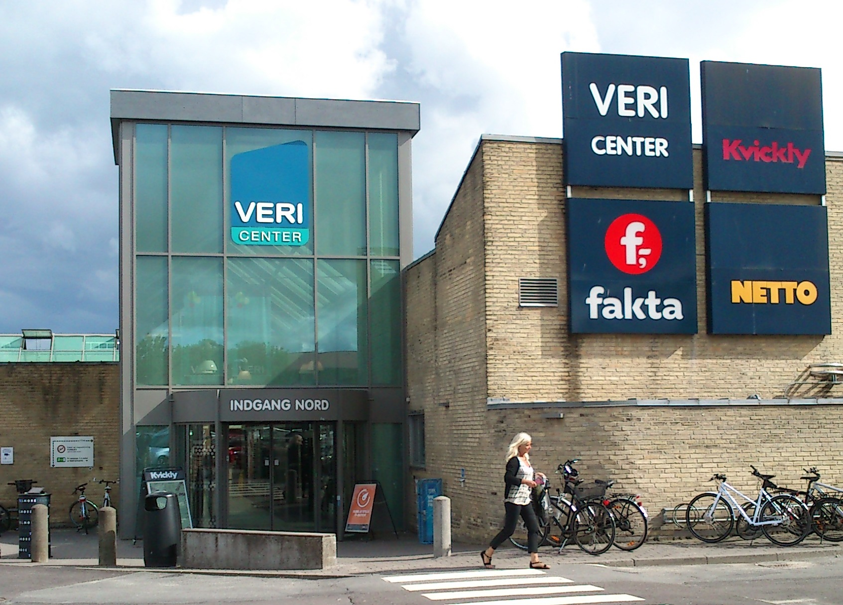 Veri centret, indgang nord.